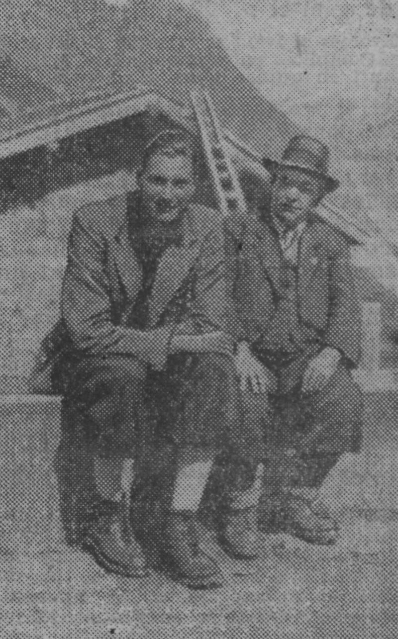 "Le prince Napoléon (à gauche) en excursion dans les environs de Lausanne".